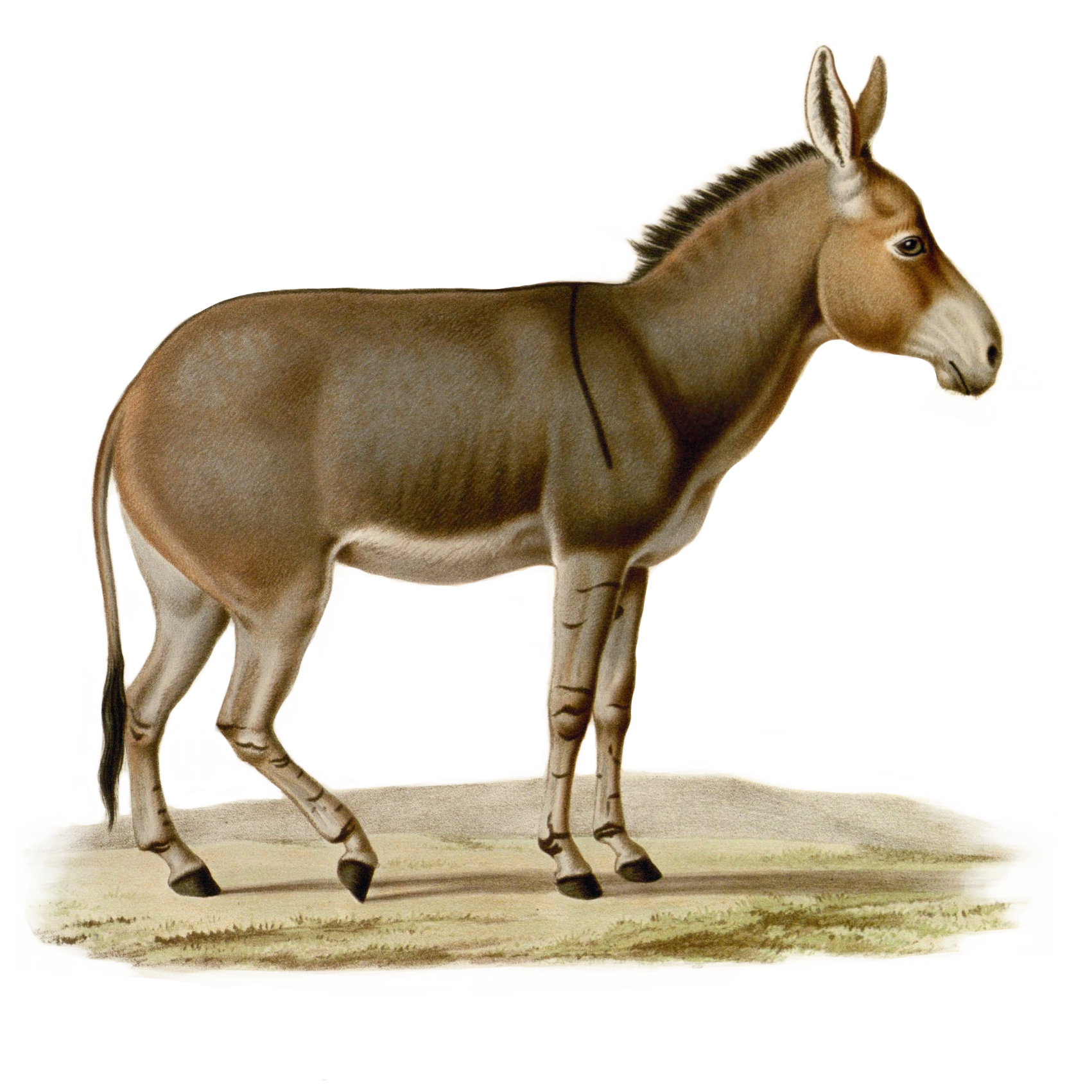 Equus asinus somaliensis